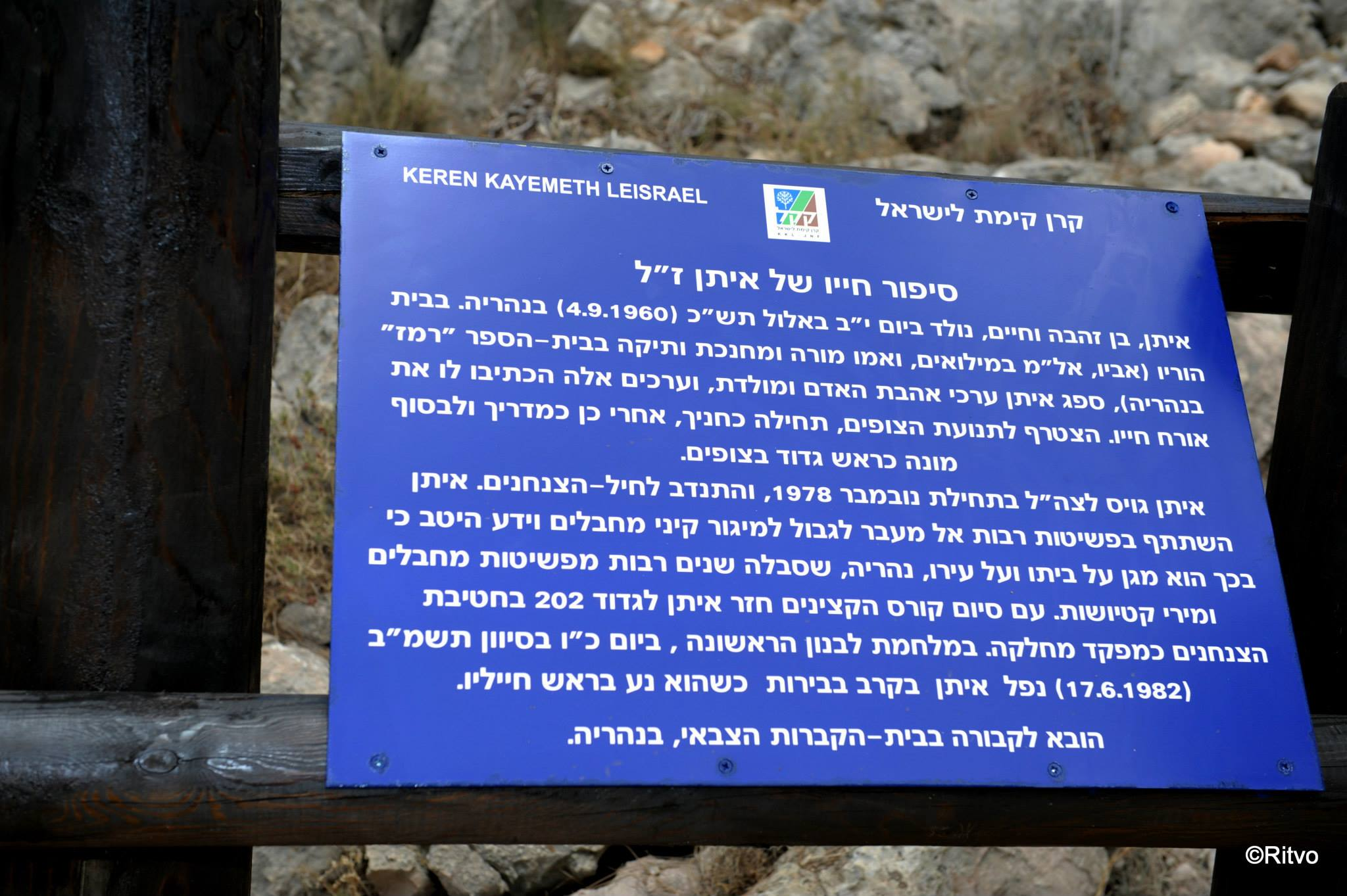 שלט במצפה איתן לבב